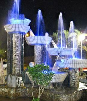 esta plaza fue construida en memoria a los primeros pobladores de Tingo MaríaUnknown this square was built in memory of the firsts citizens of tingo maria